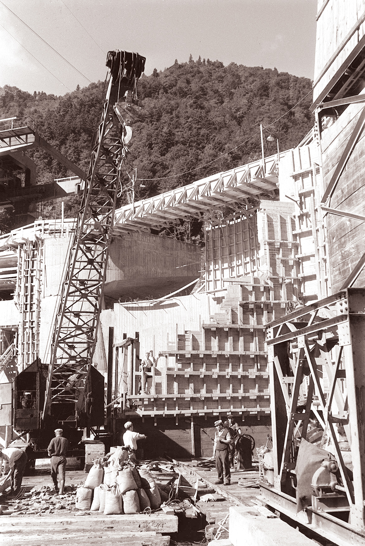 Gradbišče hidroelektrarne Ožbalt